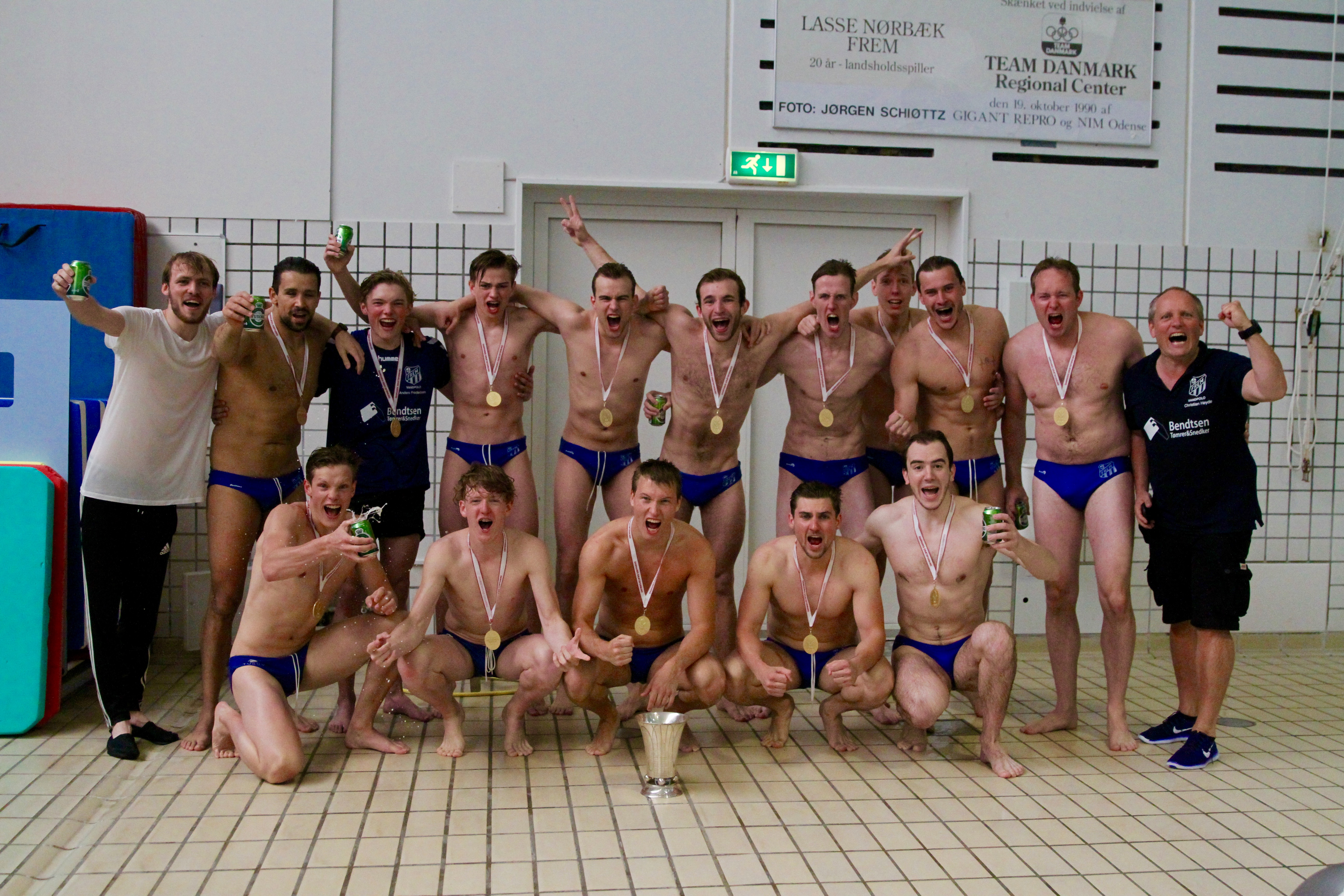 FREMs Danske Mestre 2017